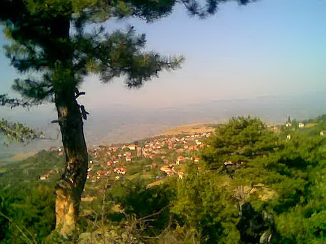 Поглед към село Плоски от Керимдол